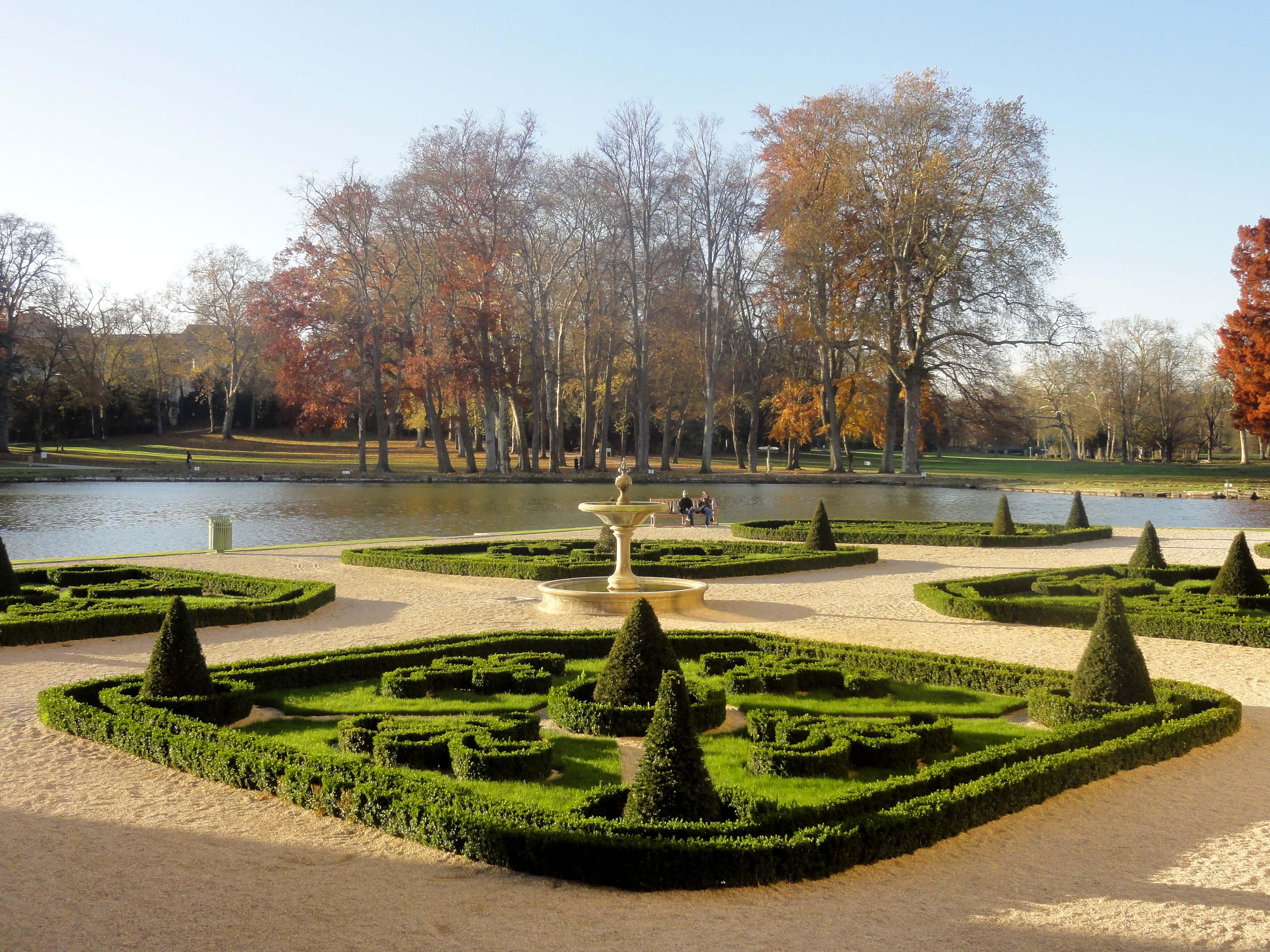 Jardin de la volière.